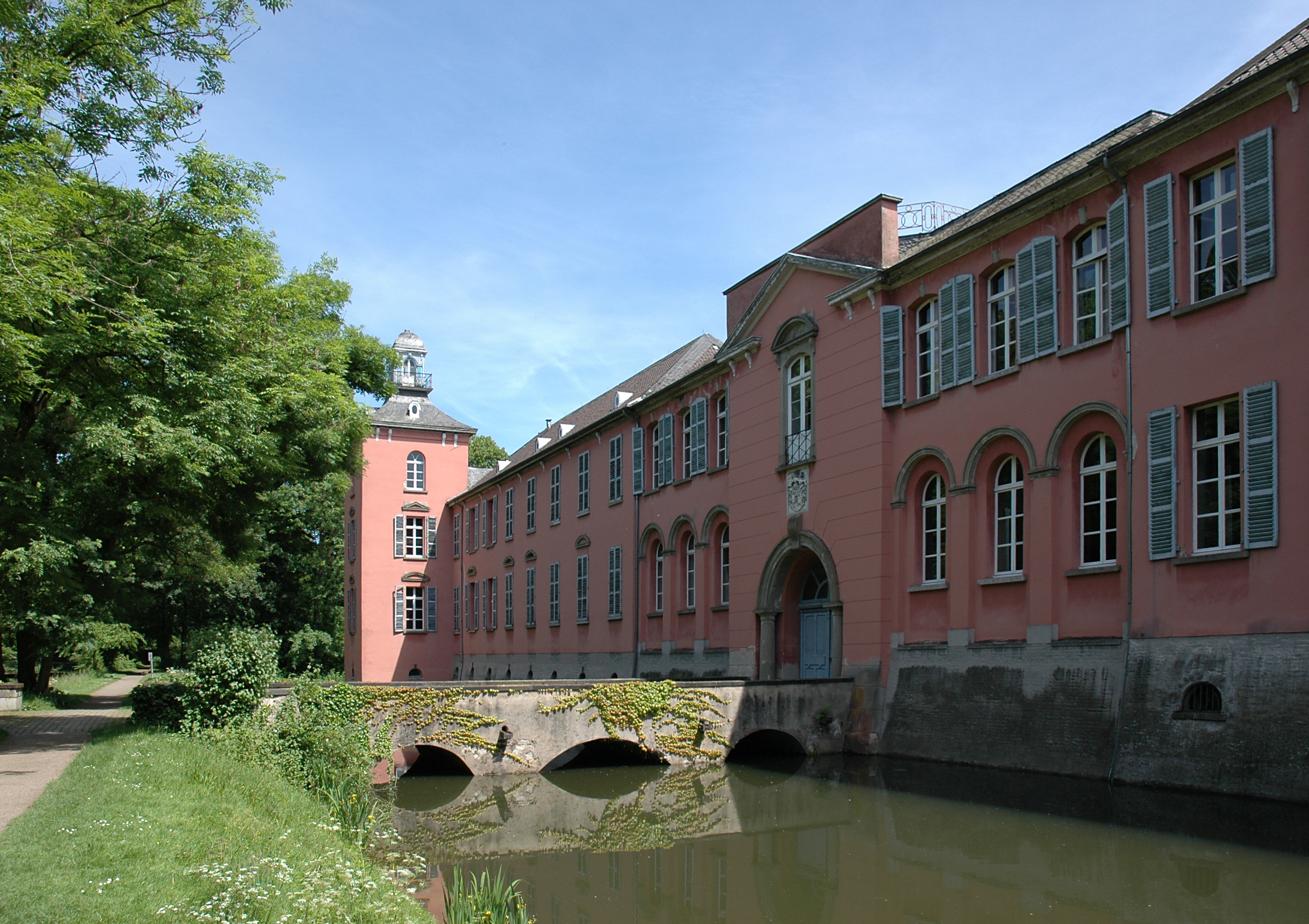 Schloss Kalkum, Westflügel